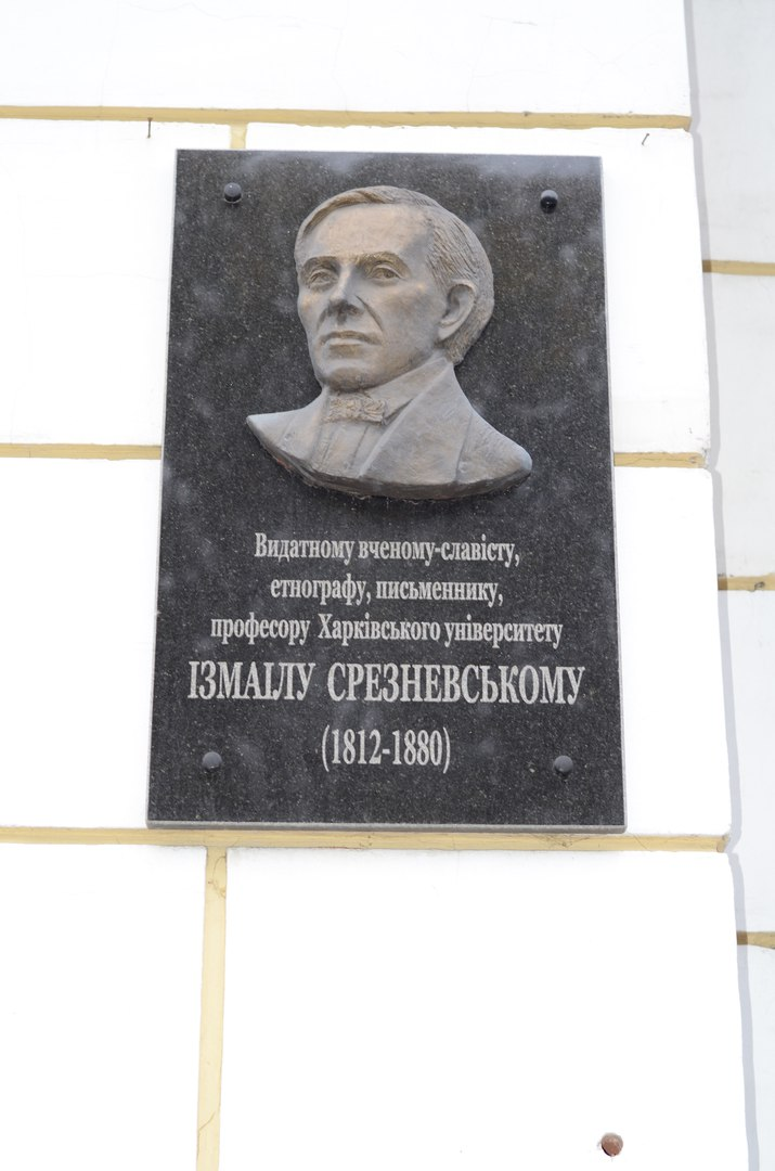 Харьков